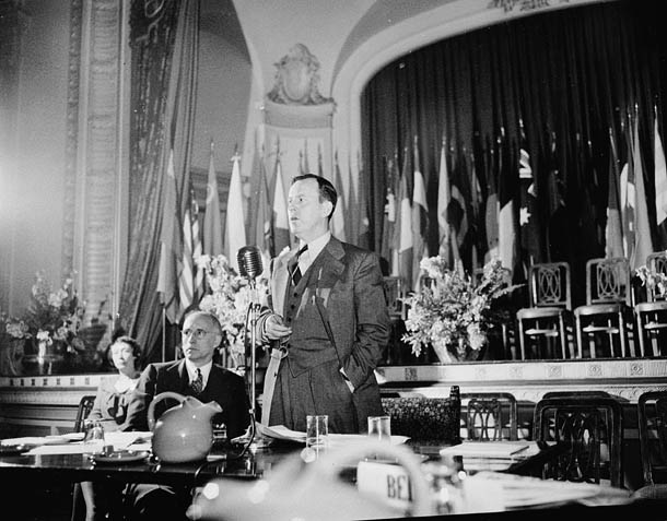 Title / Titre : Lester Bowles Pearson presiding at a plenary session of the founding conference of the United Nations' Food and Agriculture Organization/Lester Bowles Pearson préside une séance plénière de la conférence de fondation de l'Organisation des Nations Unies pour l'alimentation et l'agriculture. Creator(s) / Créateur(s) : National Film Board of Canada / Office national du film du Canada Date(s) : October 1945 / octobre 1945 Reference No. / Numéro de référence : MIKAN 3193180, 3624072 Location / Lieu : Québec, Quebec, Canada / Québec, Québec, Canada Credit / Mention de source : National Film Board of Canada. Library and Archives Canada, PA-117587 / Office national du film du Canada. Bibliothèque et Archives Canada, PA-117587